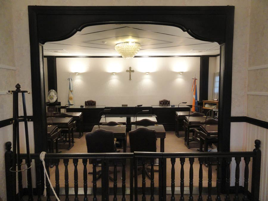 Antiga sede do governo, Museo del Fin del Mundo